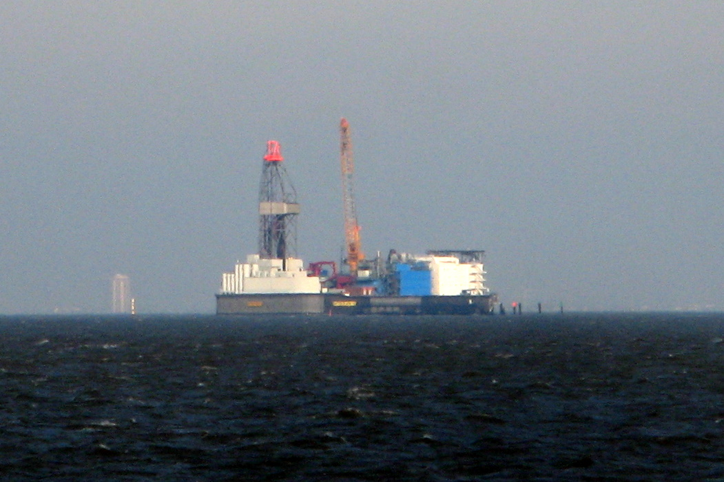 Ölbohrinsel Mittelplate mit Versorgungsschiff im Nationalpark Wattenmeer, fotografiert von der Seeseite.